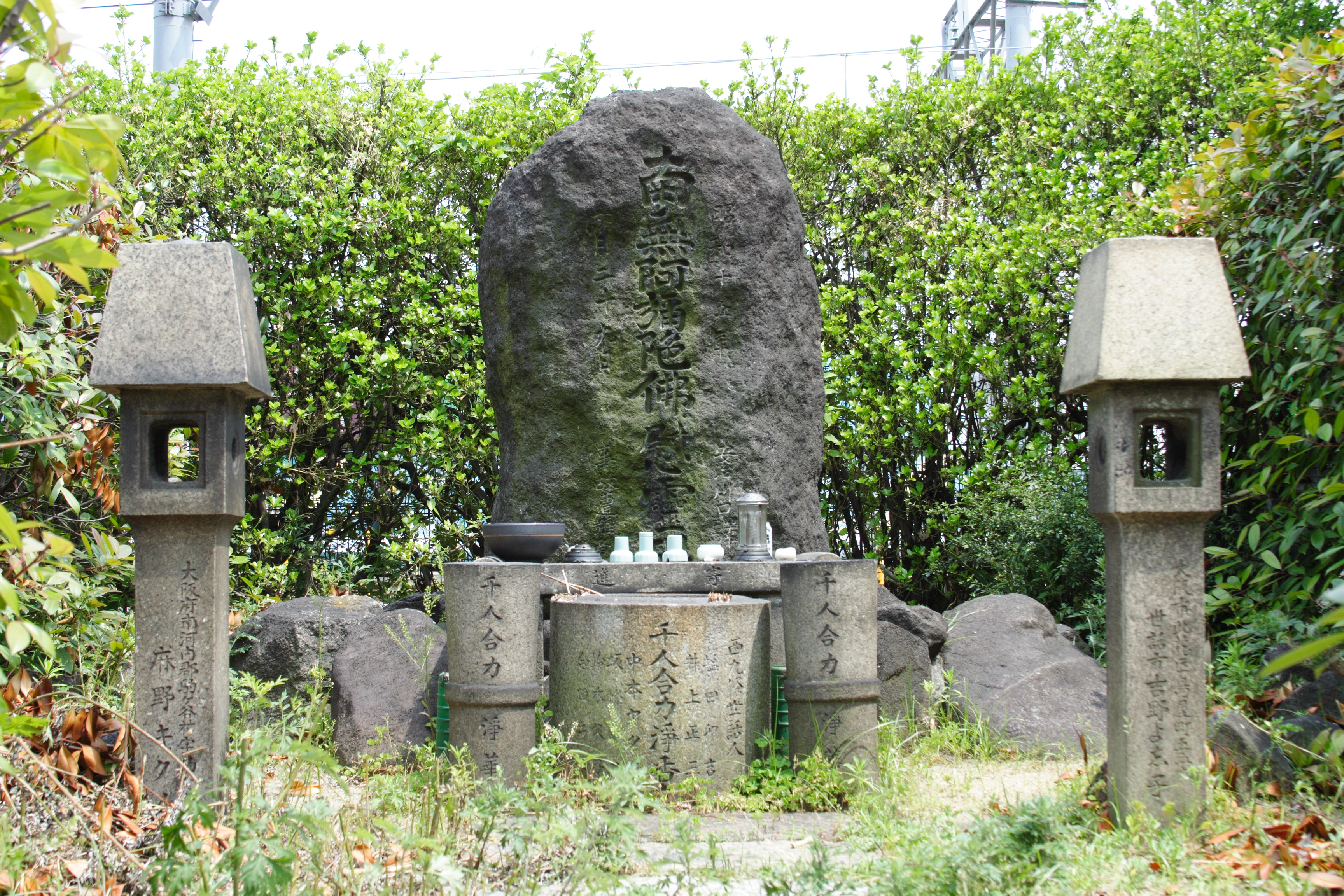 西成線列車脱線火災事故慰霊碑(大阪府大阪市此花区安治川口駅そば)